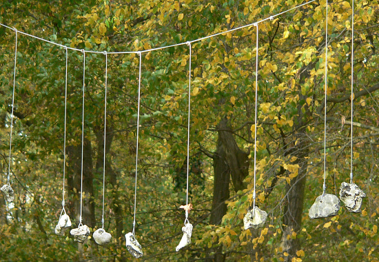 Kunstwanderweg Ars natura bei Fritzlar im Obersten Holz